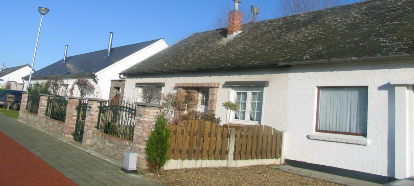 Mechelen, de wijk Marokken. Foto Marc Alcide 25 december 2005